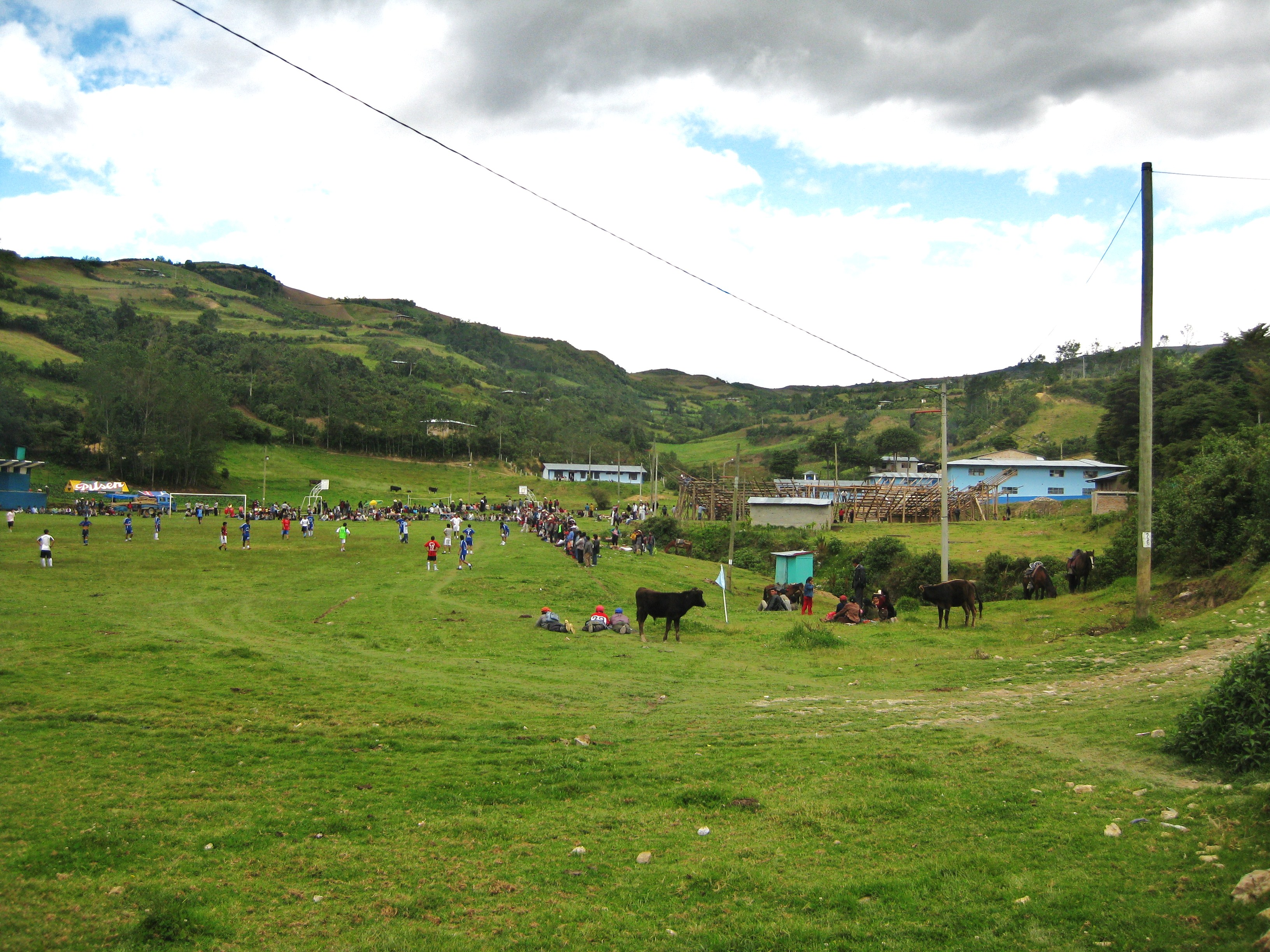 Centro Poblado de Cadmalca Alto